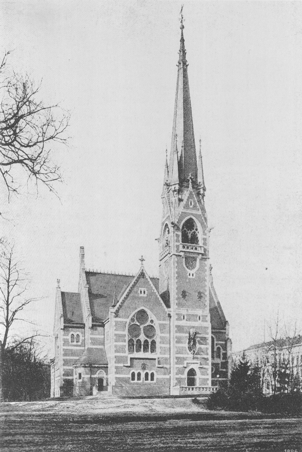 Kaiser-Friedrich-Gedächtniskirche(Emperor Friedrich Memorial Church) (aka KFG) in Berlin-Hansaviertel, Händelstraße (today: Händelallee) 20-22. Architect: Johannes Vollmer, built 1893-1895; the church was destroyed in WW II